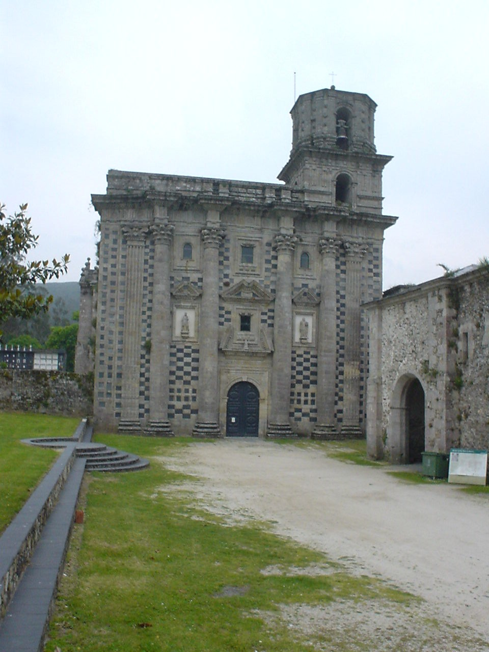 Kloster Monfero (Galicien), Kirchenfassade